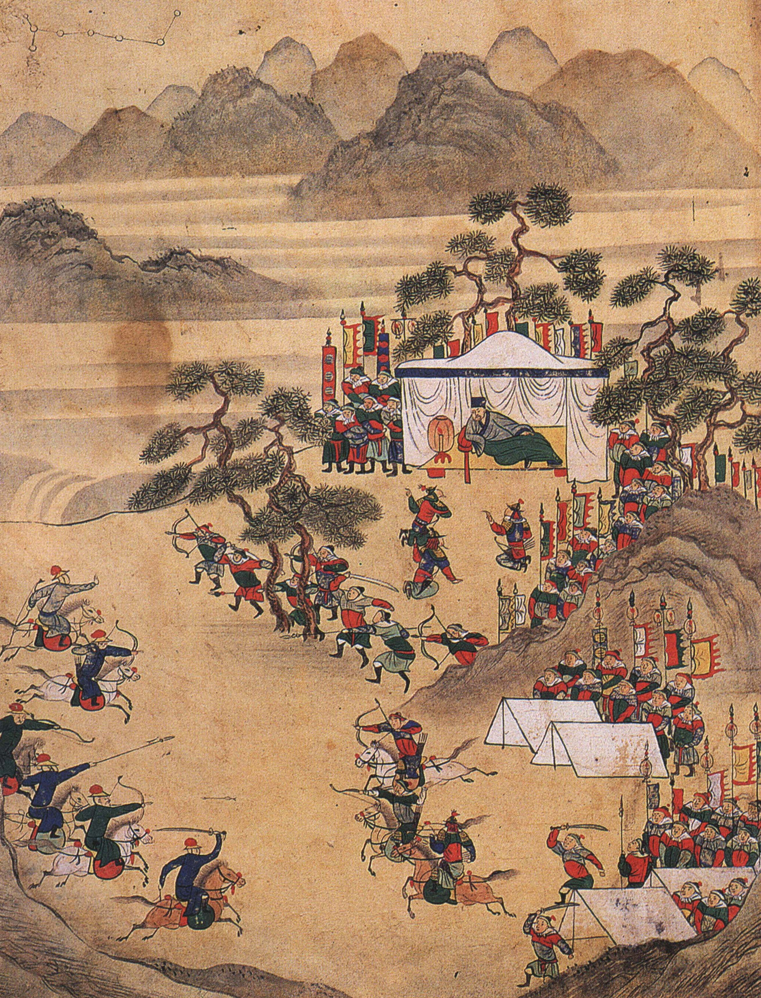 북관유적도첩(北關遺蹟圖帖)-야전부시도(夜戰賦詩圖)